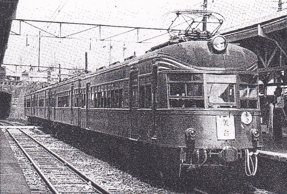 名鉄850系電車851編成（モ851-ク2351）。前面幕板部へ「なまず」の愛称の由来となった3本の飾り帯が入れられていた当時。名古屋本線金山橋駅（現・金山駅）にて撮影。